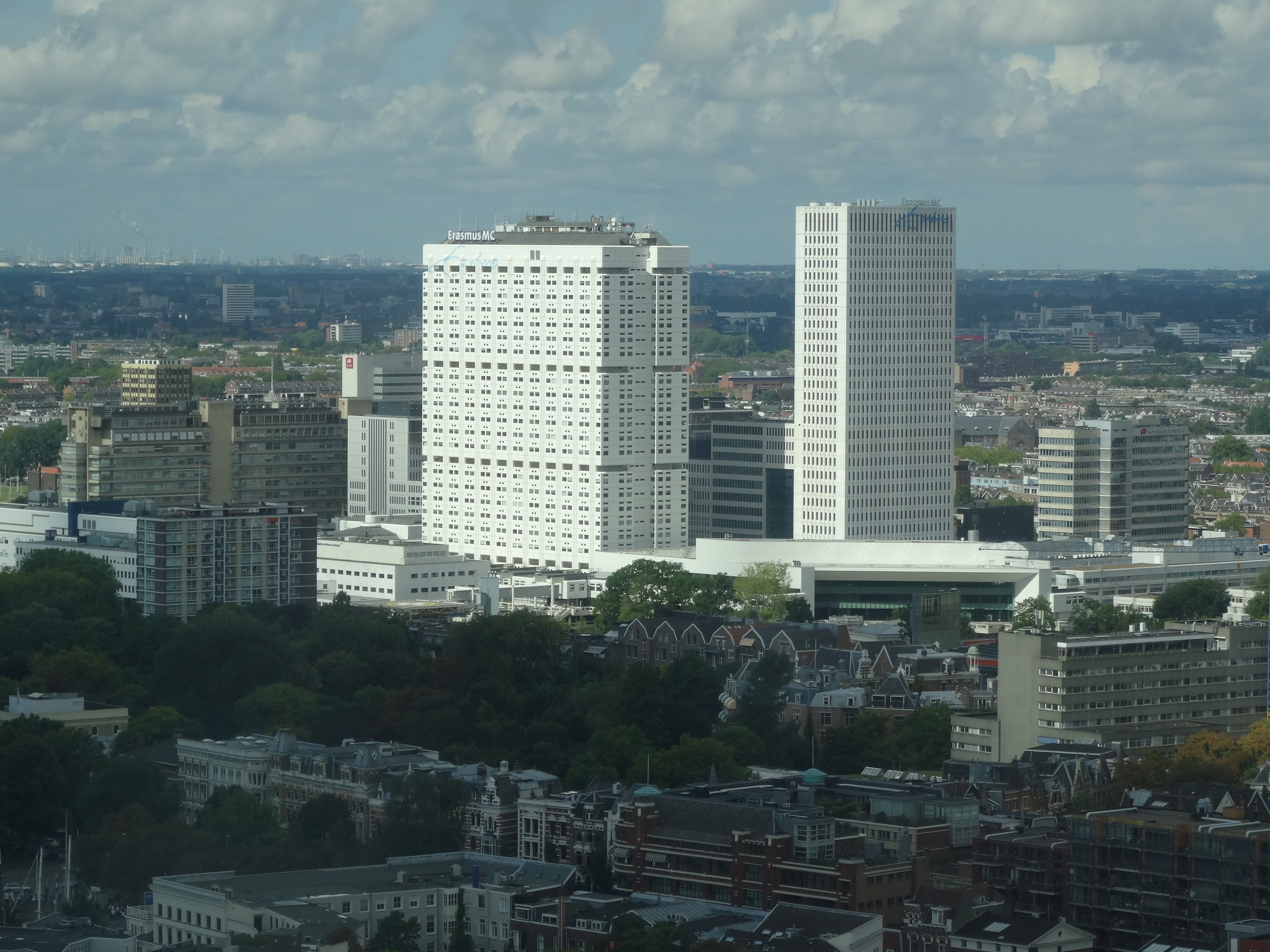 Het Erasmus MC vanaf de 33e etage van gebouw De Rotterdam tijdens de Wereldhavendagen van 2017.